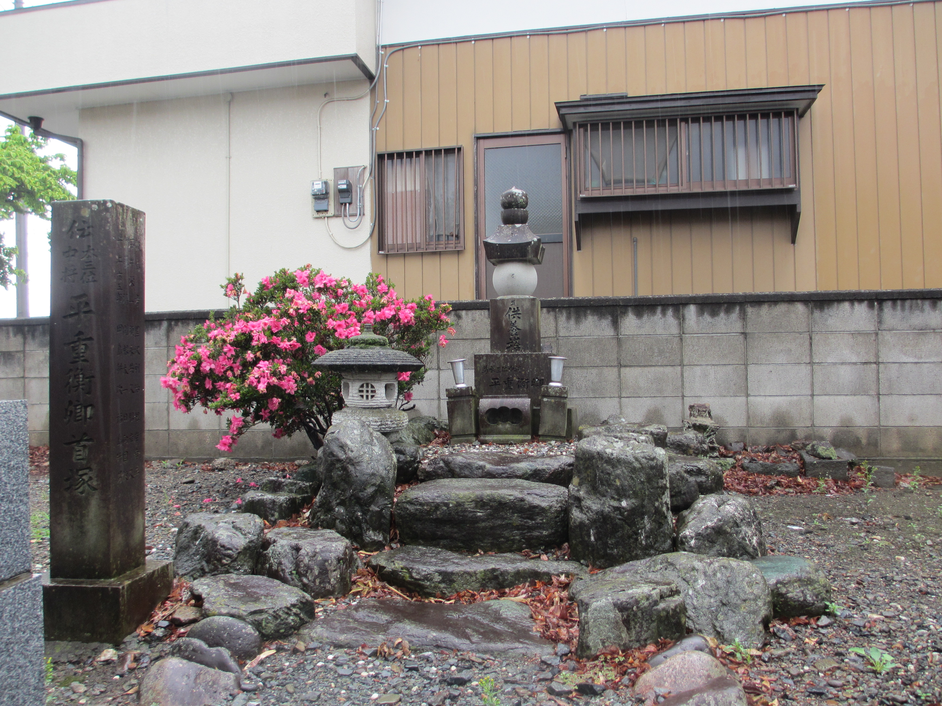 本庄市児玉町蛭川214-3駒形神社隣426号線沿い